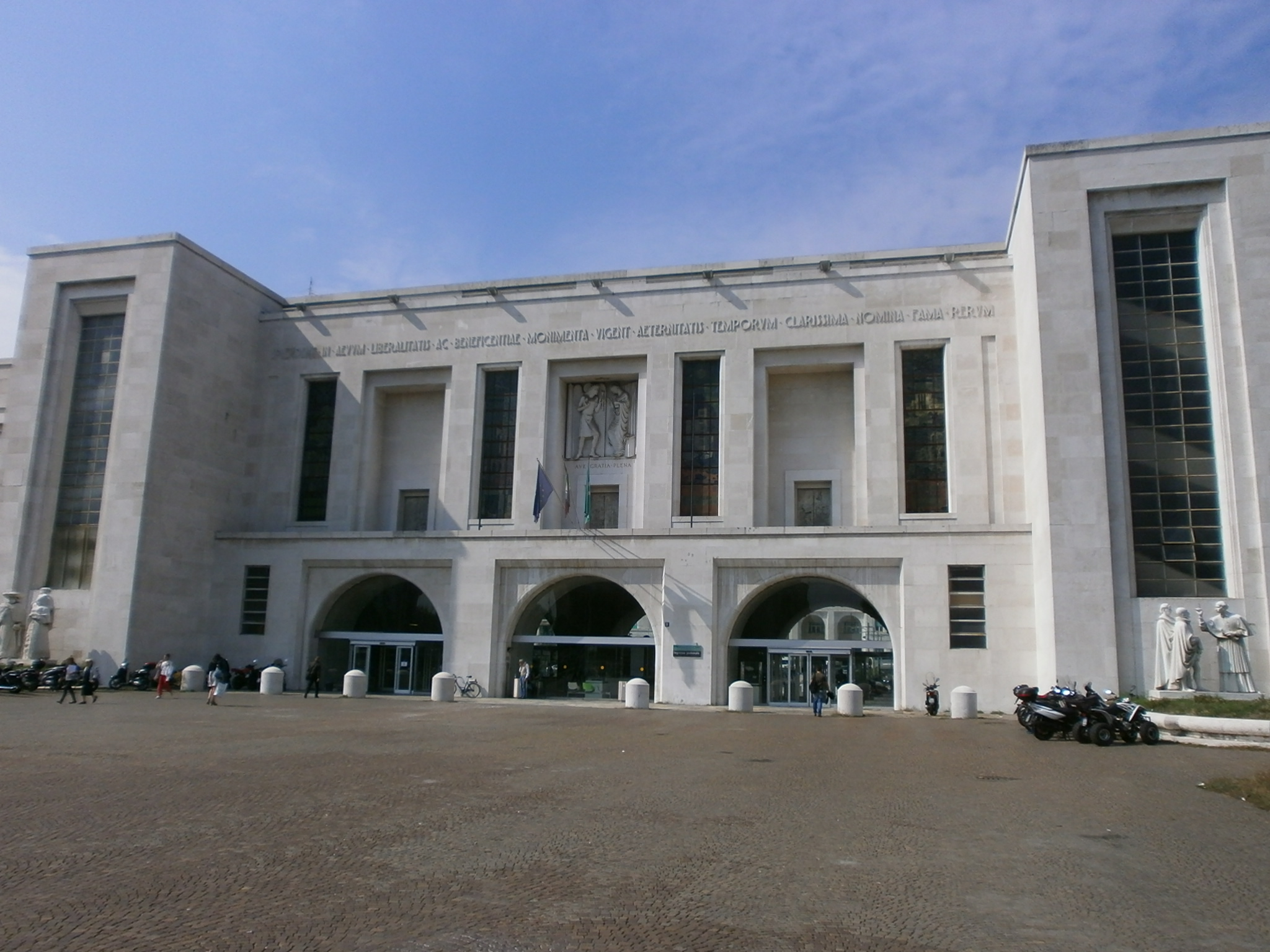 Ospedale Ca'Granda Niguarda di Milano - facciata 03